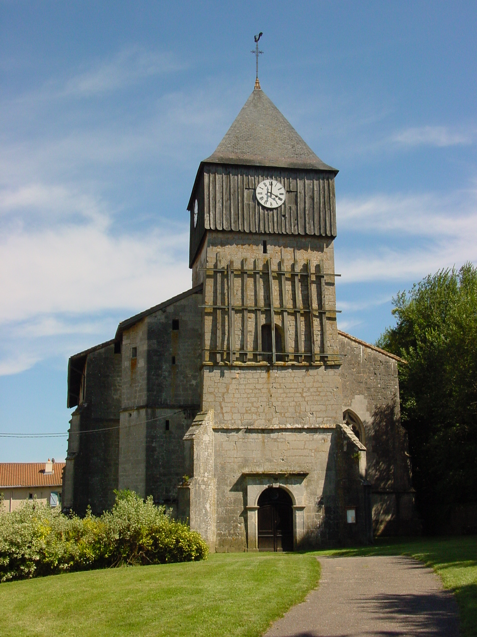 l'église de Gironville (Meuse, France)